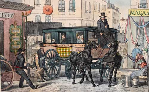 Pariser Kutsche. Lithographie von Gihaut frères nach Loeillot Hartwig, um 1850.